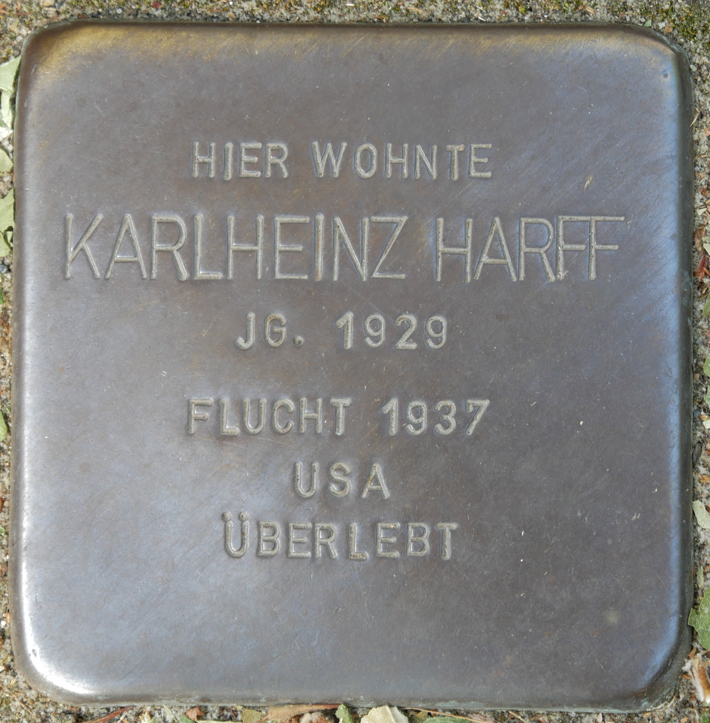 Stolpersteine Wesel: Harff, Karlheinz